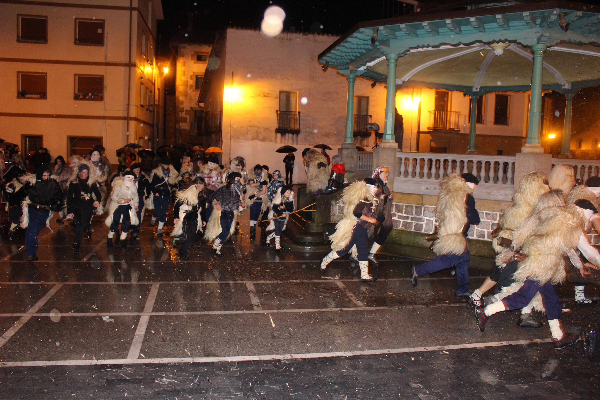 zamarroak plazan